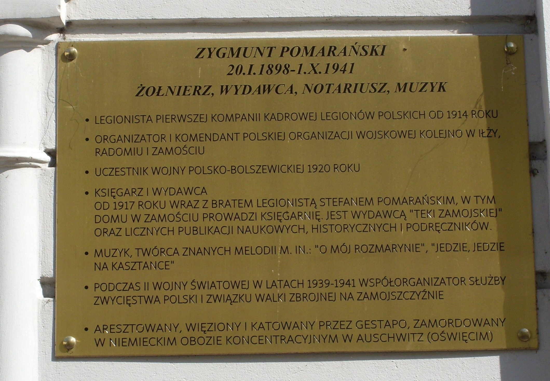 Zygmunt Pomarański. Tablica w Zamościu ul. Bazyliańska (Dom Centralny). Polski żołnierz Pierwszej Kompanii Kadrowej Józefa Piłsudskiego i Wojska Polskiego; wydawca, księgarz, kompozytor. Brat Stefana Pomarańskiego i Józefa Pomarańskiego. Mieszkaniec Zamościa. Skomponował m.in. melodię do pieśni "O mój rozmarynie". Zamordowany w Auschwitz.